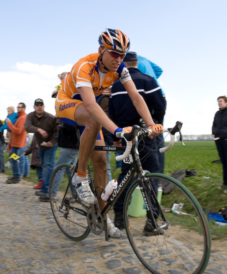 Joost Posthuma (Parijs-Roubaix 2008)